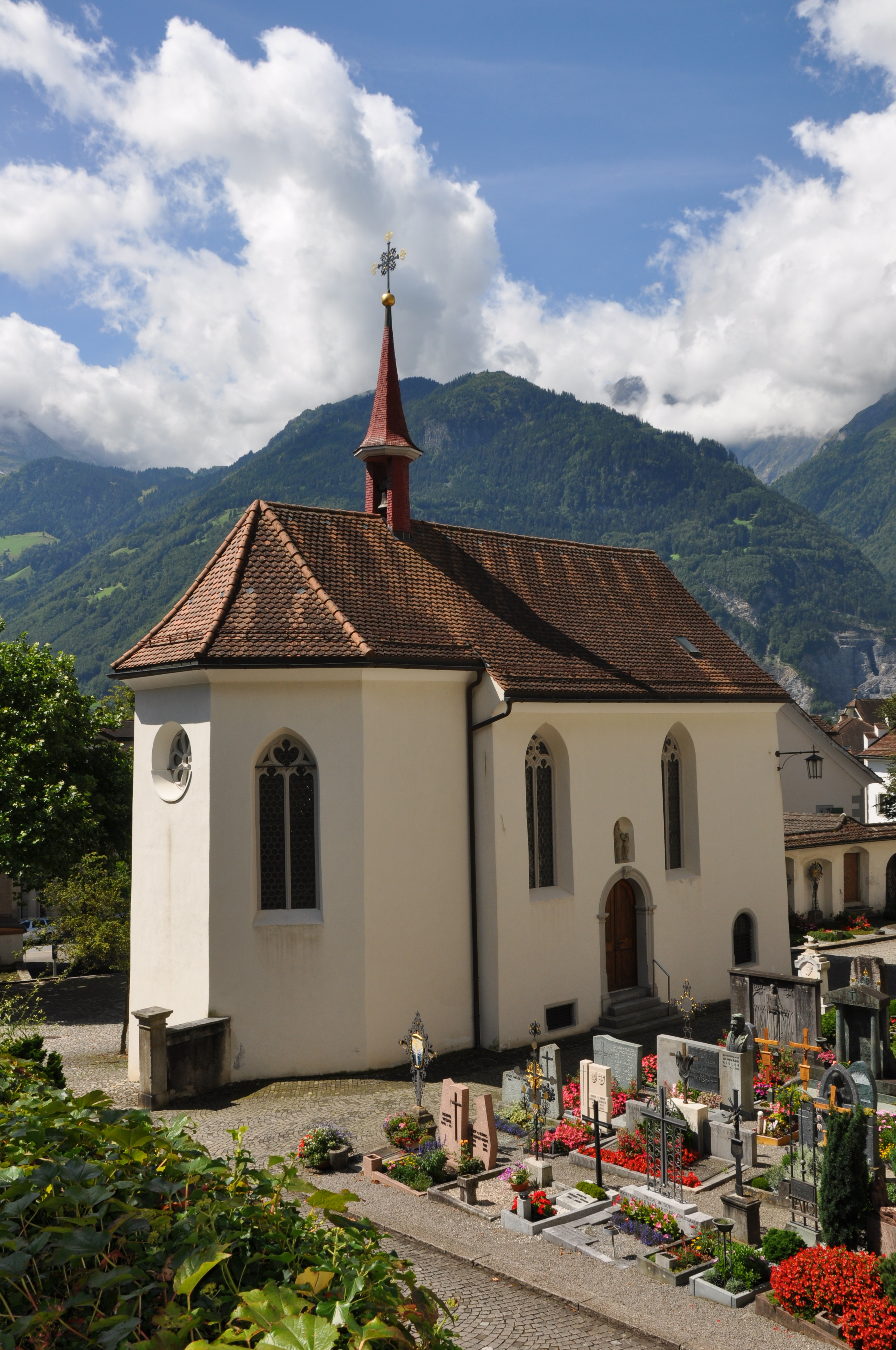 Chapelle St.Anna